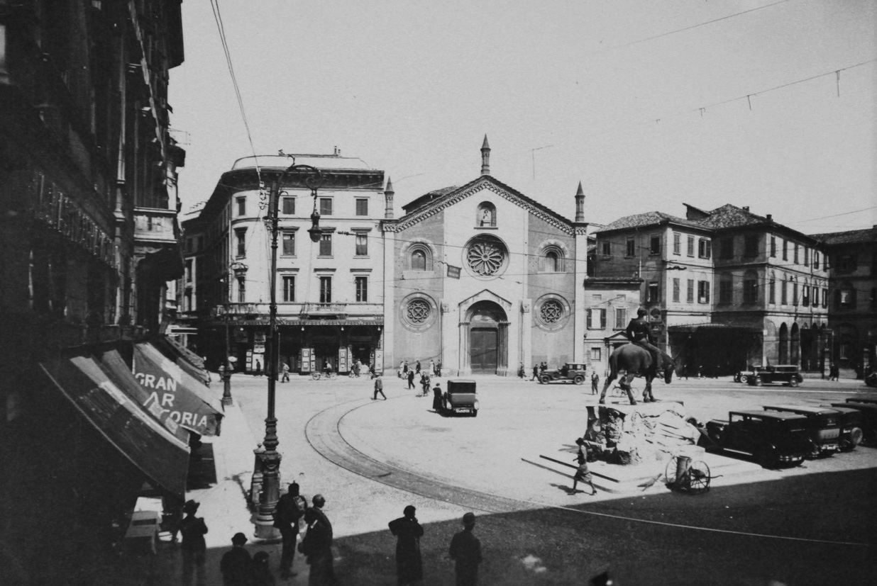 Milano, piazza Missori